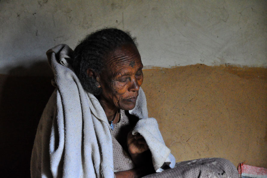 Ethiopia